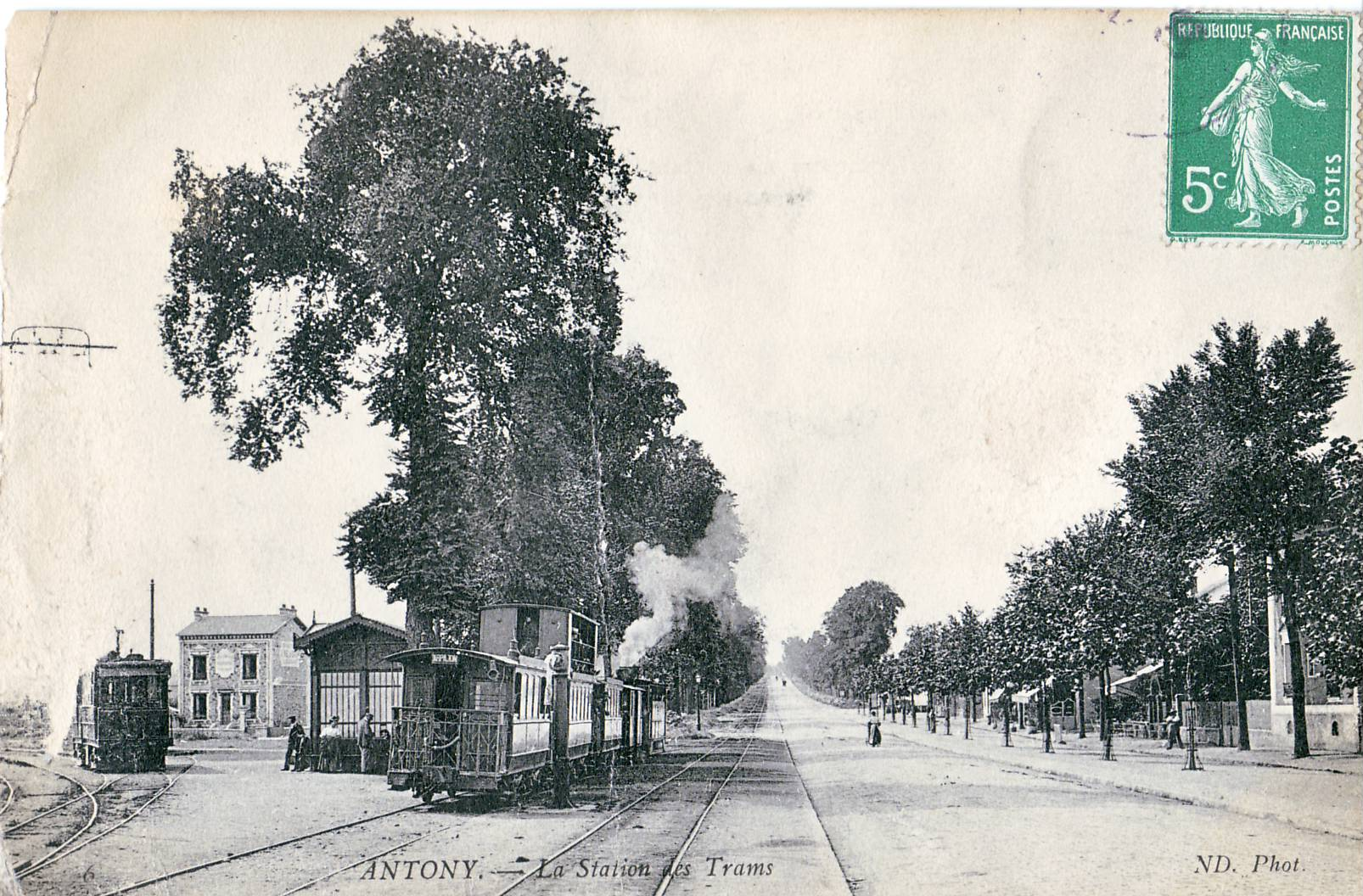 Carte postale ancienne, éditée par ND N°6 : la gare de l'Arpajonnais à Antony (où s'arrêtait la partie électrifiée de la ligne venant de Paris